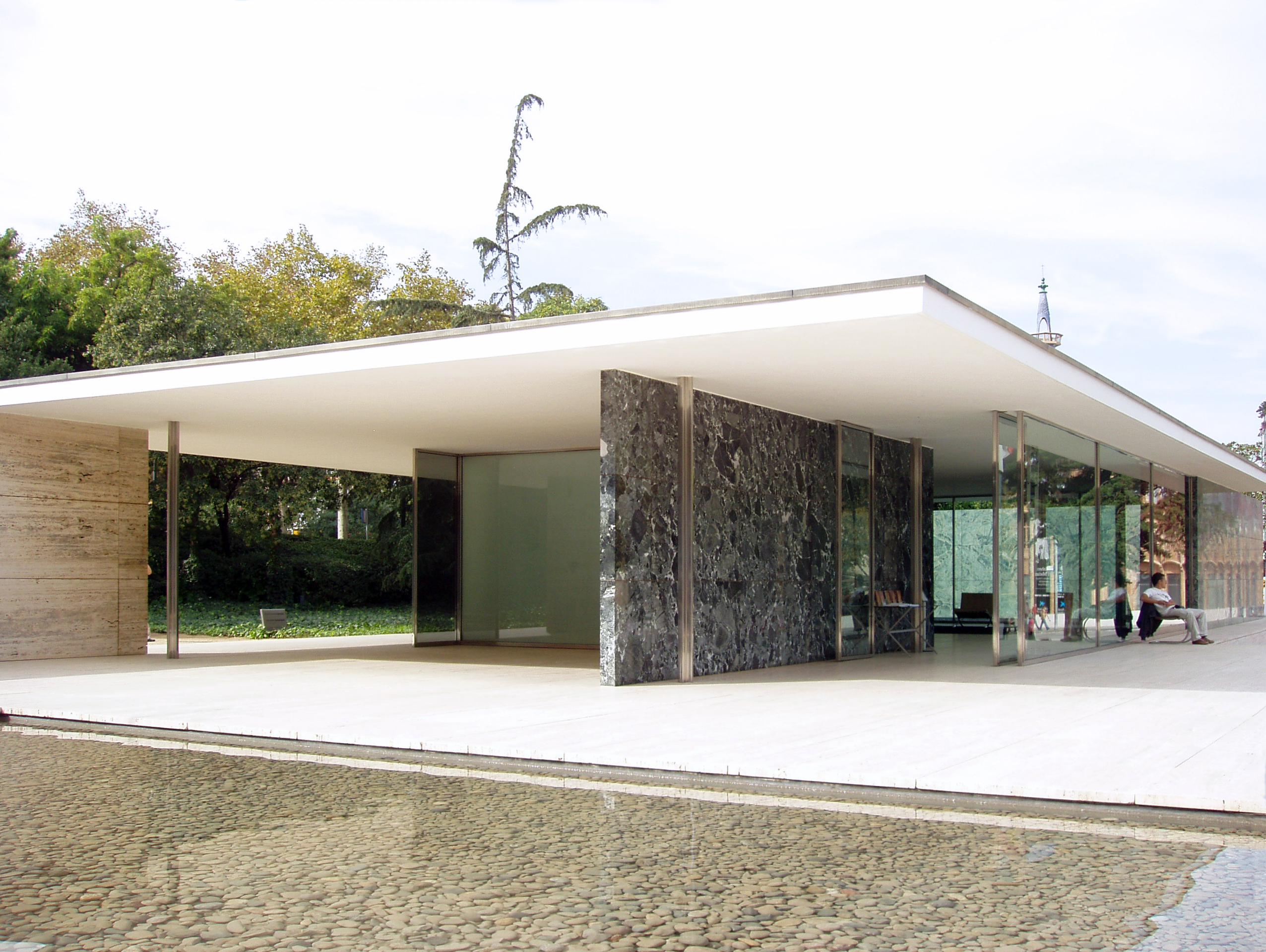 Pabellón de Alemania en la Exposición Universal de Barcelona 1929 (reconstruido). Arquitecto Ludwig Mies van der Rohe.